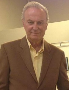 Oyuncu Ediz Hun